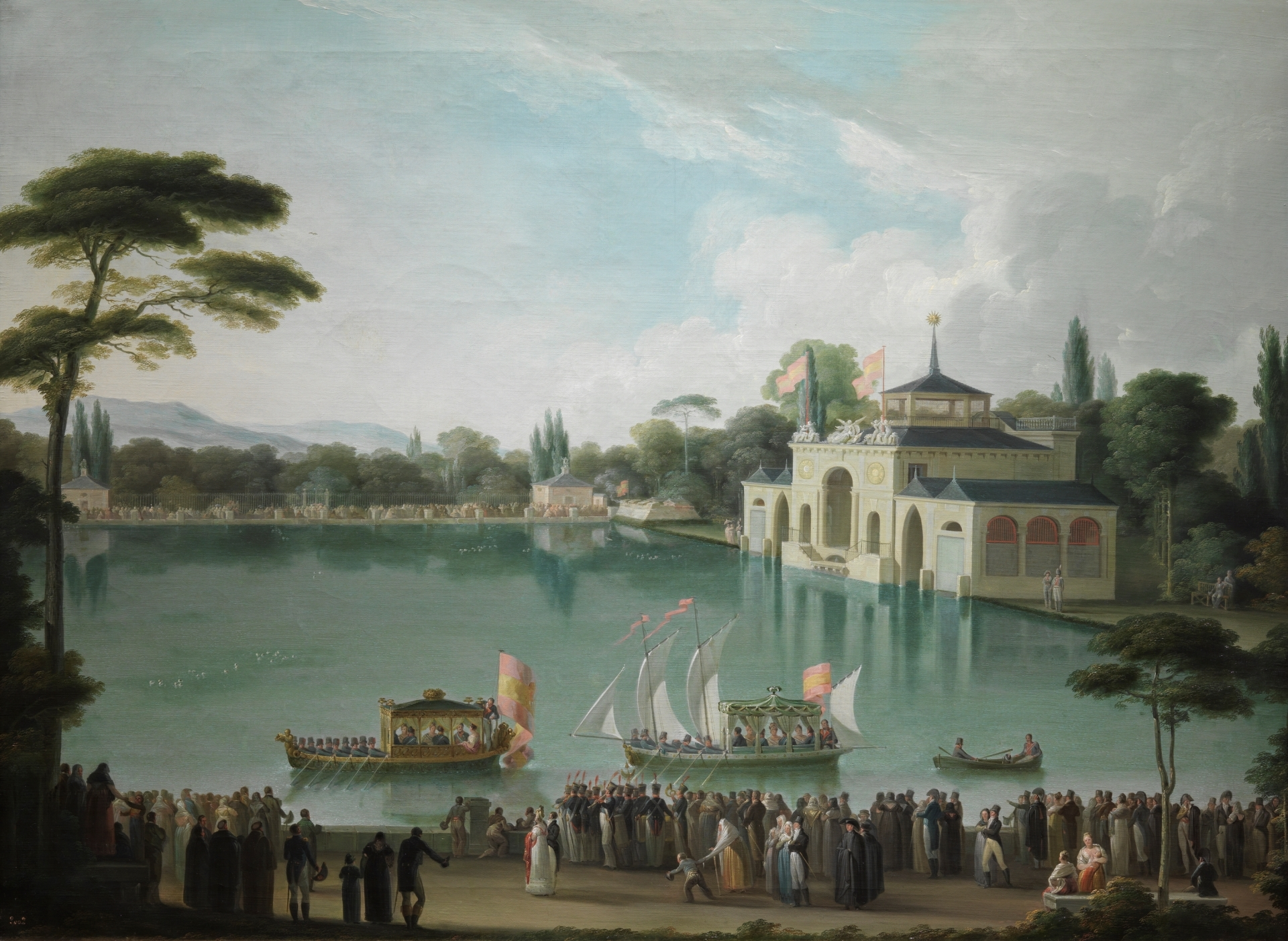 La obra representa al rey Fernando VII de España (1784-1833) y a su segunda esposa, la reina Isabel de Braganza, paseando en falúa por el Estanque Grande del Buen Retiro de Madrid.